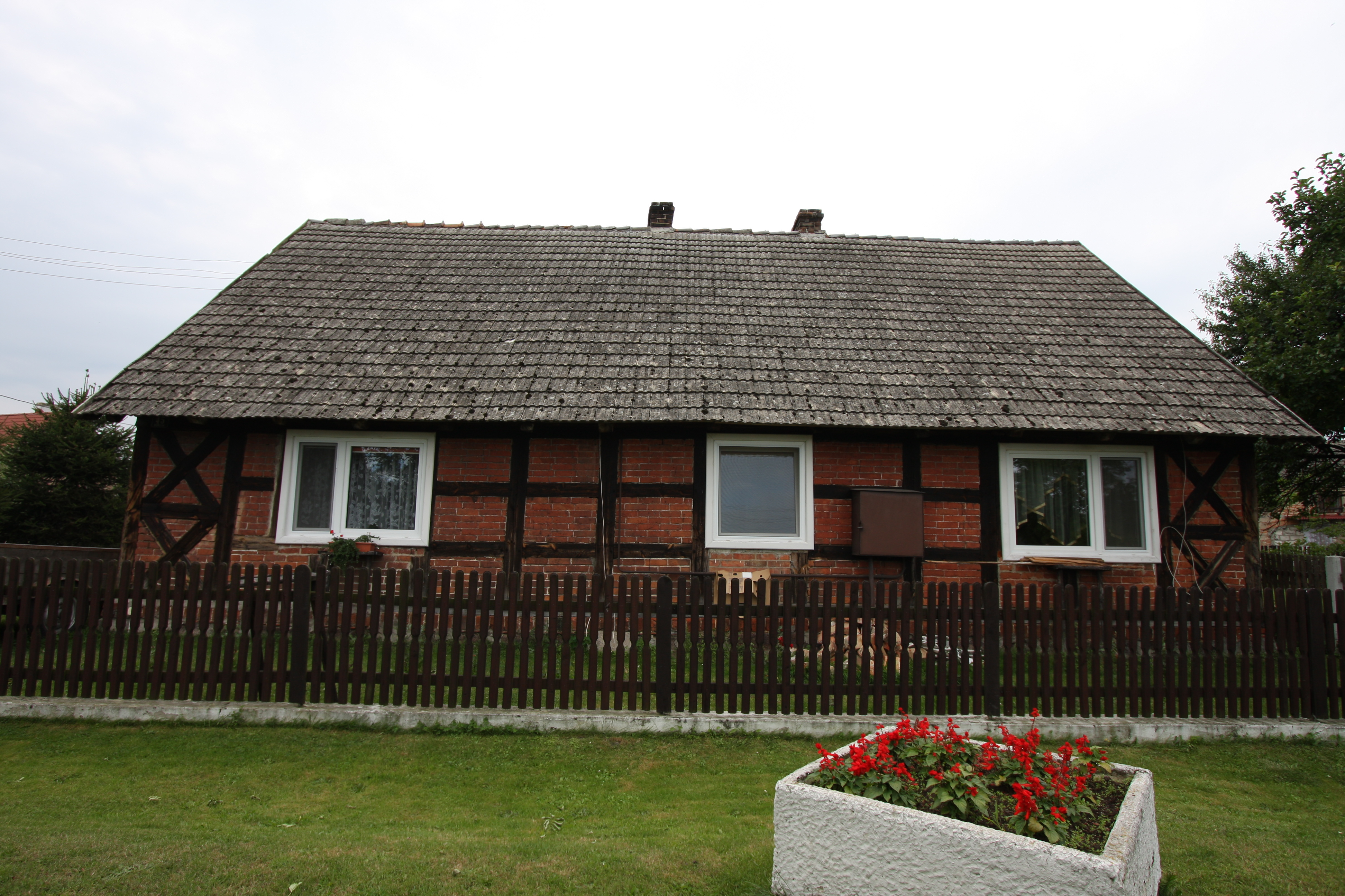 Boruja, dom nr 45, drewn., poł. XIX